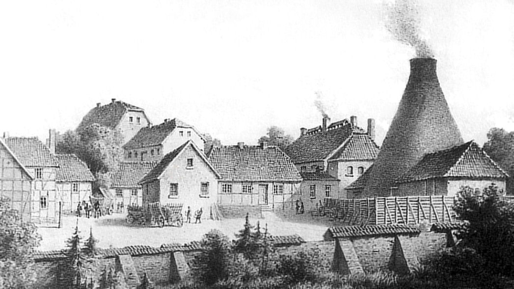 Glashütte Steinkrug in idealisierter Darstellung, die Vielzahl der abgebildeten Gebäude hat tatsächlich nie bestanden